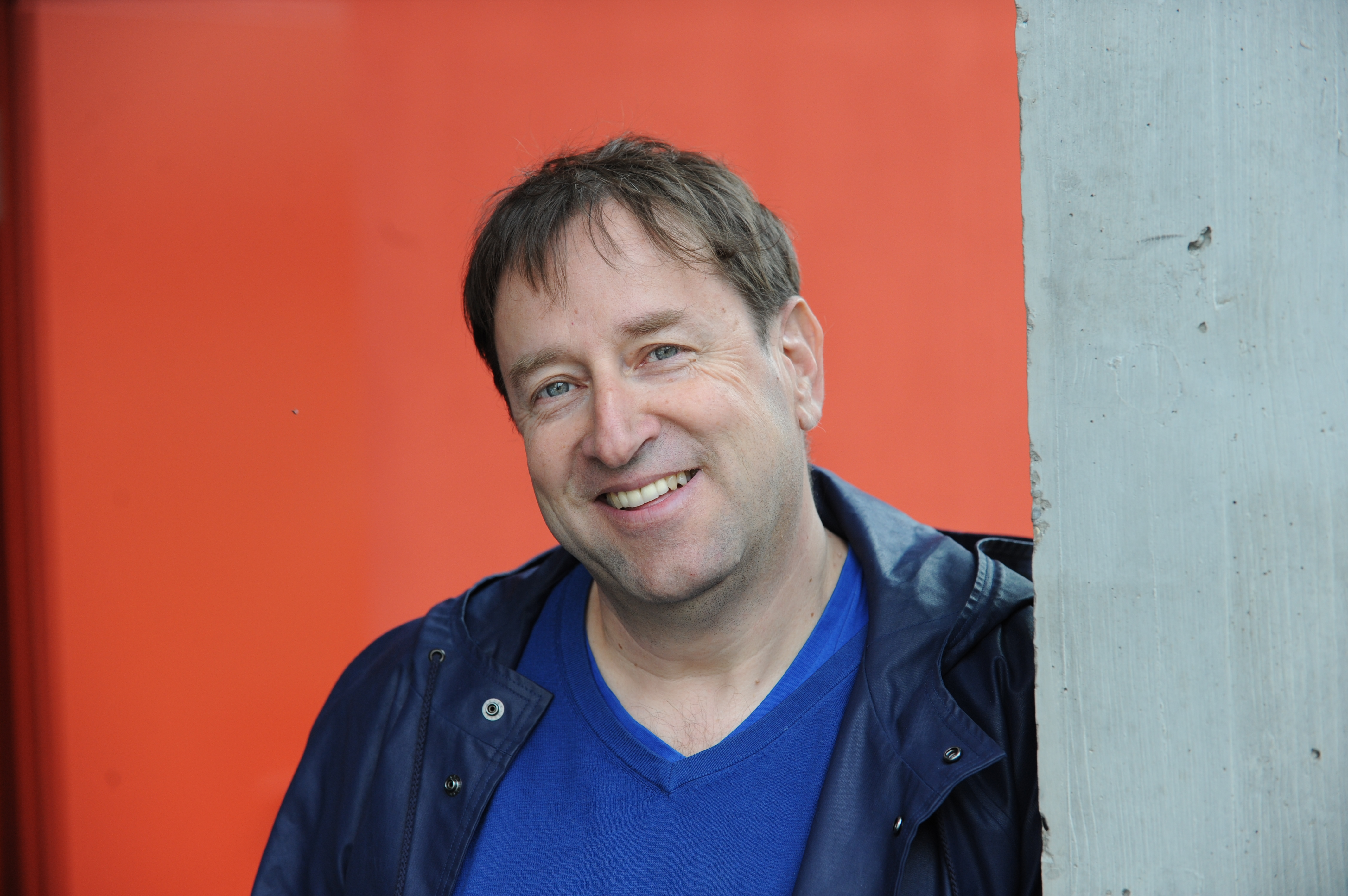 Deitsch: Georges Delnon 2014 (von Peter Schnetz)